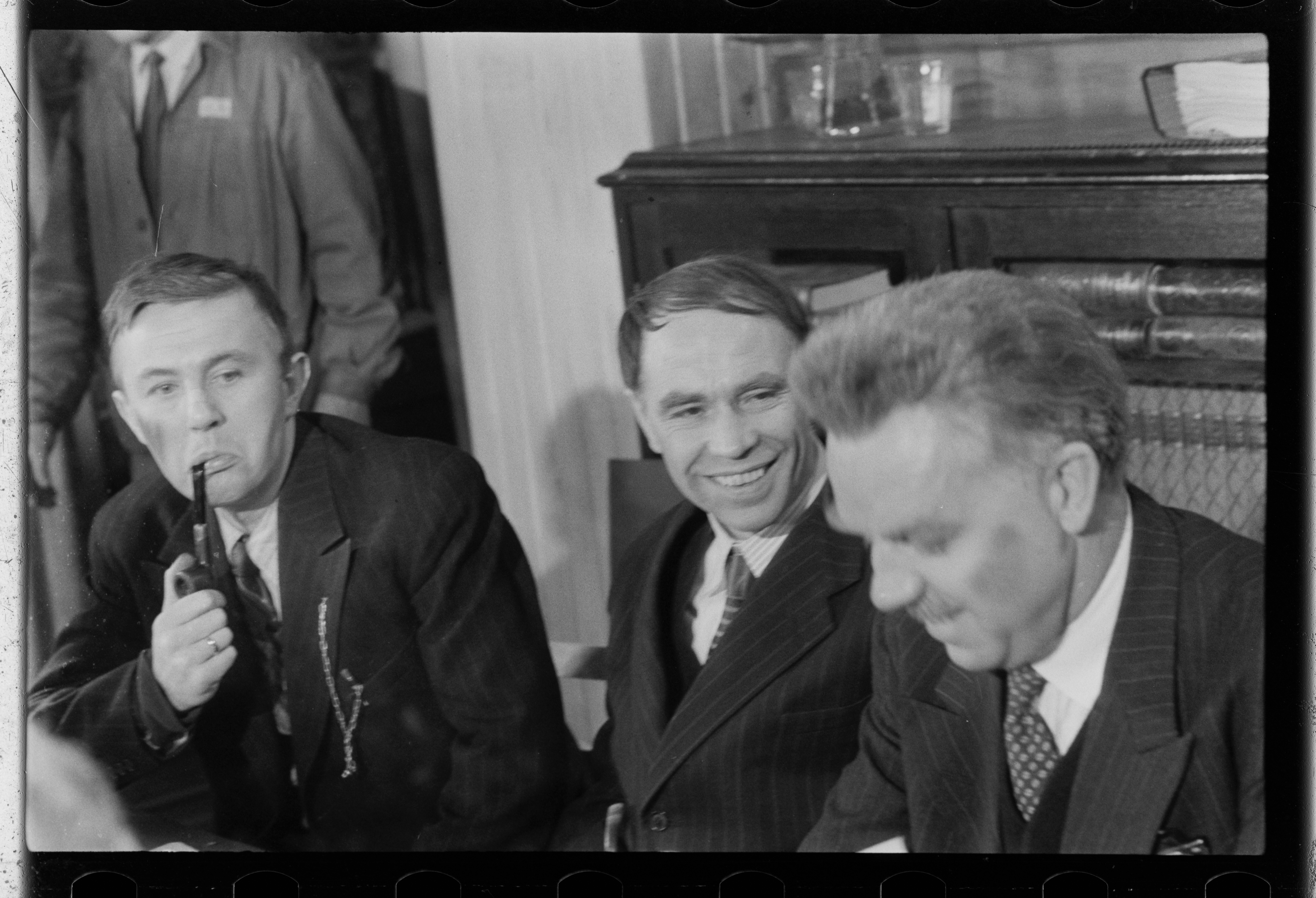 Bildet er hentet fra Arkivverket. Foto tatt i forbindelse med reportasje om den norske filmen Freske fraspark fra 1963. Manus var ved Kjell Aukrust og Bjørn Breigutu. Regi ved Bjørn Breigutu. Kjell Aukrust, Leif Juster, Turid Caldwell, Alfhild Hovdan, Per Bistrup, Lalla Carlsen Arkivinstitusjon : Riksarkivet Arkivnavn : Billedbladet NÅ Sted : Norge, Ukjent, Ukjent, Ukjent Emneord: Menn, Filminnspilling Avbildet: Ukjent